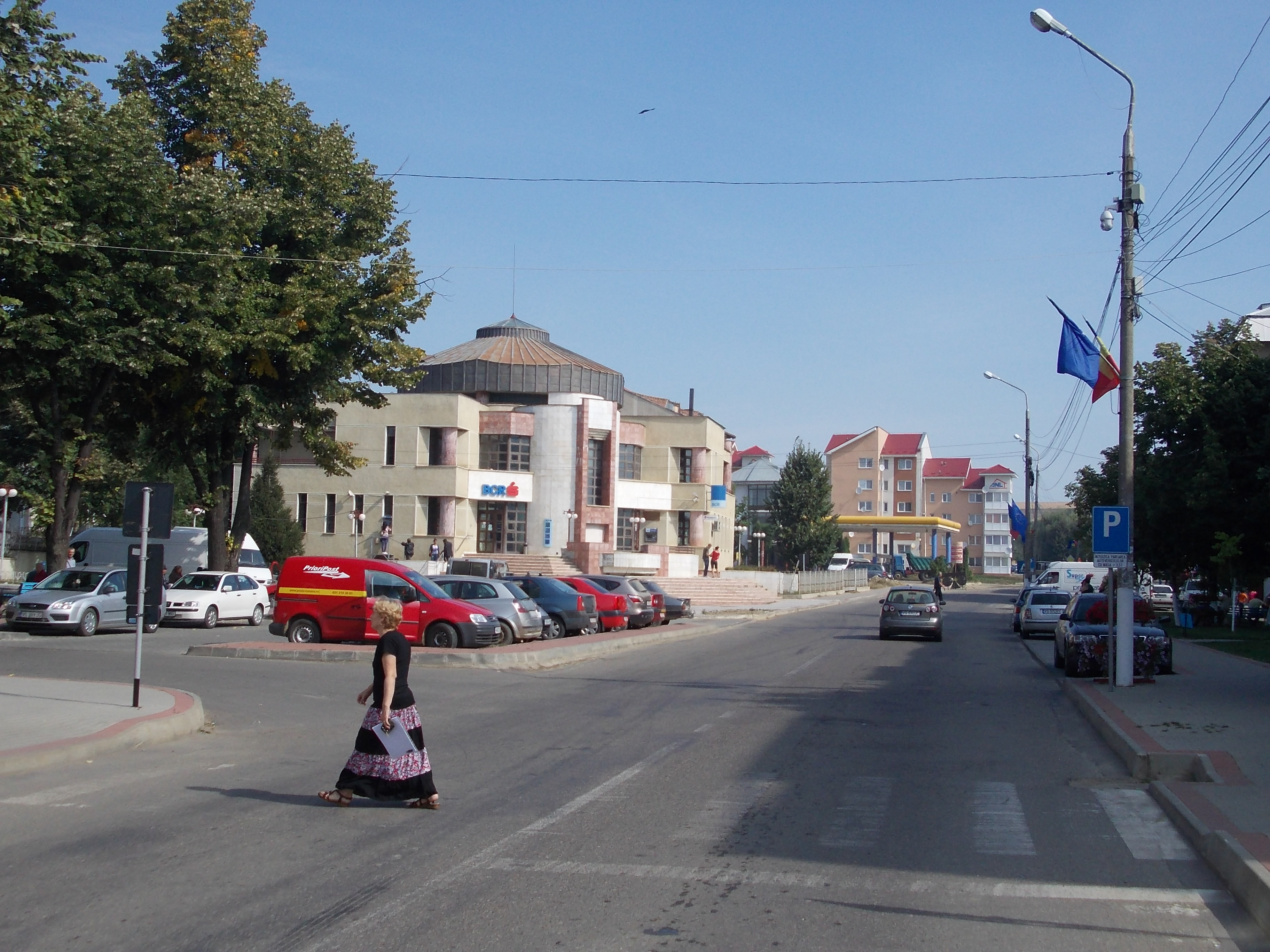 Imagine din centrul oraşului Negreşti,Vaslui